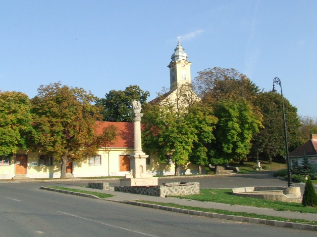 Mágocs központja, Sarlós Boldogasszony templom